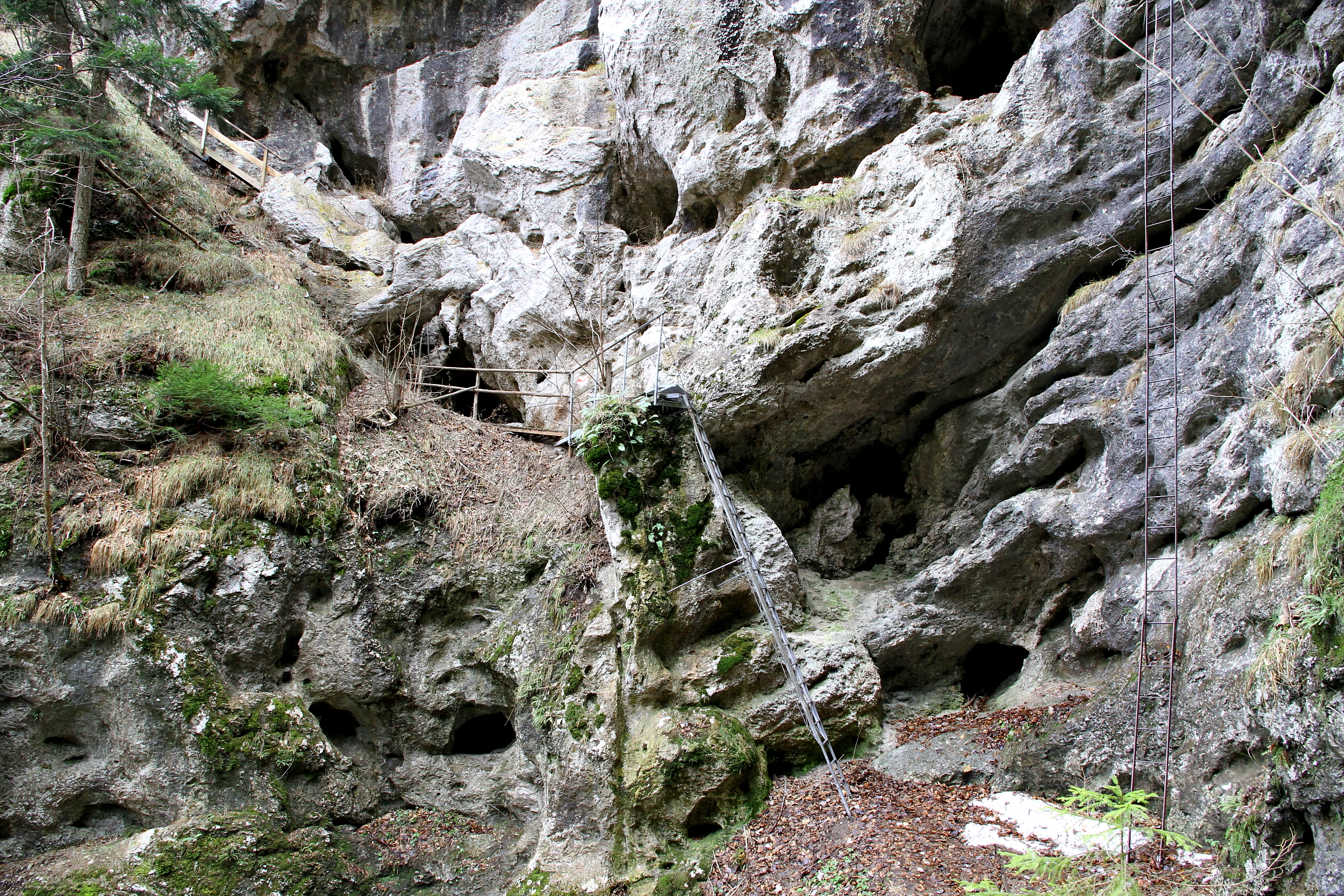 Der Rudolf-Decker-Steig im Bereich Wildschützenloch in der Steinwandklamm. Rechts die steile, lange Leiter aus dem Jahr 1927 direkt zum Wildschützenloch und links die 1983 errichtete Umgehungsleiter.